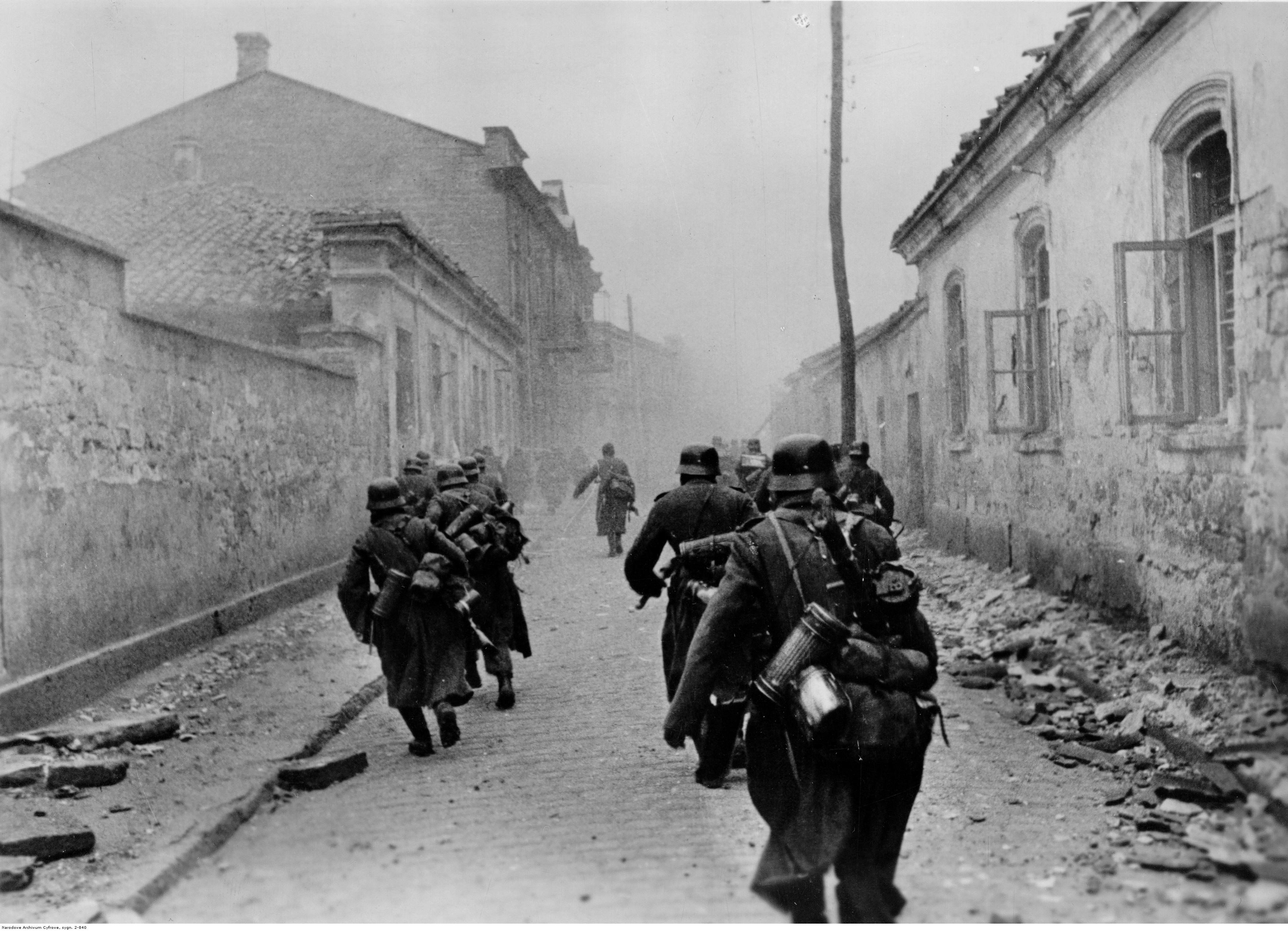 Walki uliczne w mieście na Krymie. Oddział żołnierzy przemyka się wąską uliczką.